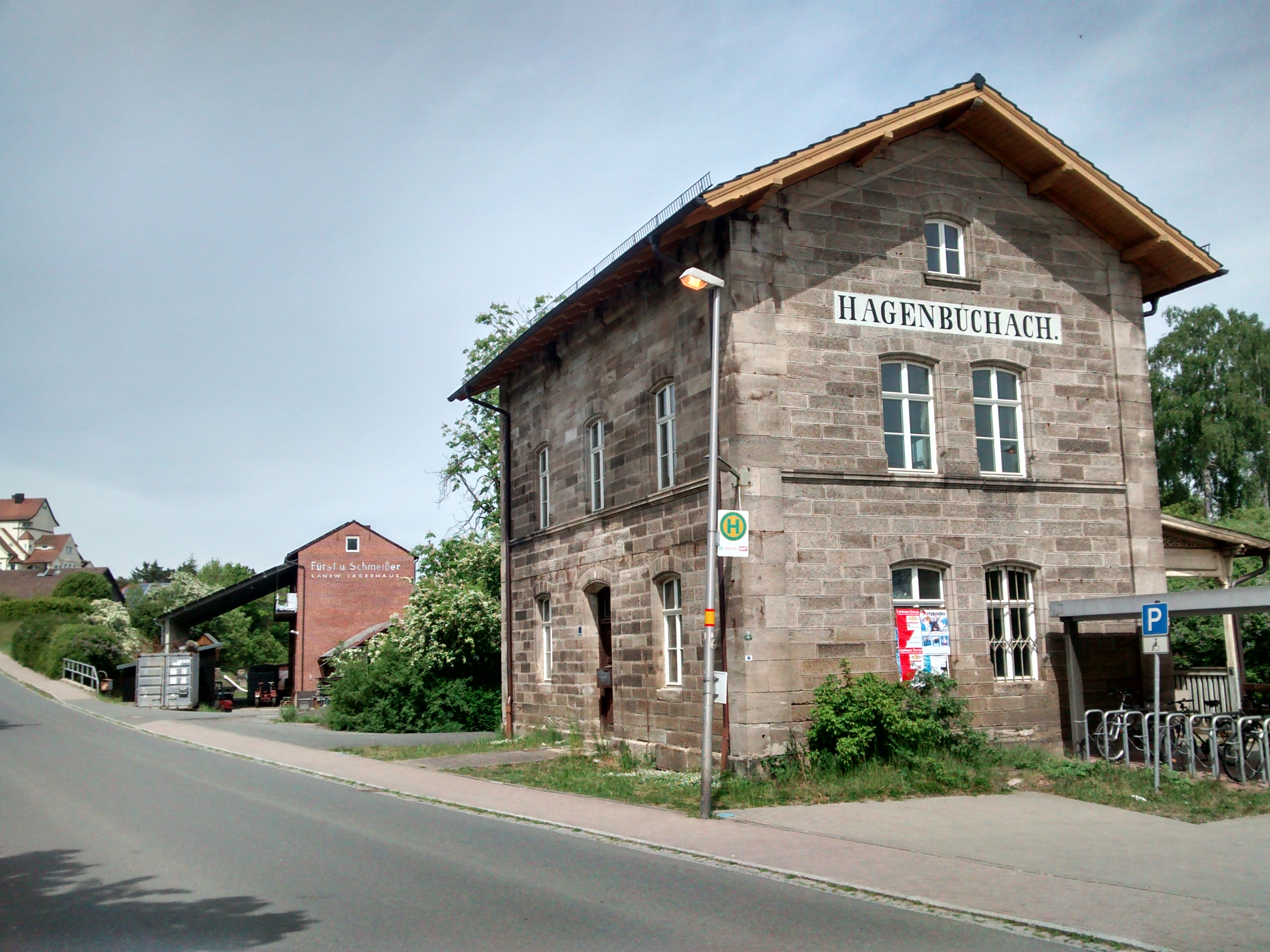 Bahnhof_Hagenbüchach